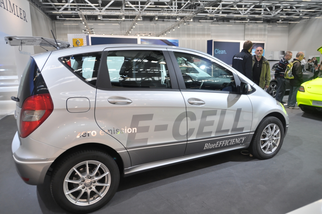 Messe i-Mobility 2012 in Stuttgart Dieses Foto entstand durch Unterstützung des gemeinnützigen Vereins Skillshare.eu Skillshare e.V. ist ein eingetragener gemeinnütziger Verein zur Förderung der Bildung durch Unterstützung der Erstellung, Sammlung und Verbreitung so genannten freien Wissens. IBAN: DE16 8306 5408 0004 8850 66 BIC: GENODEF1SLR Bank: VR-Bank Altenburger Land